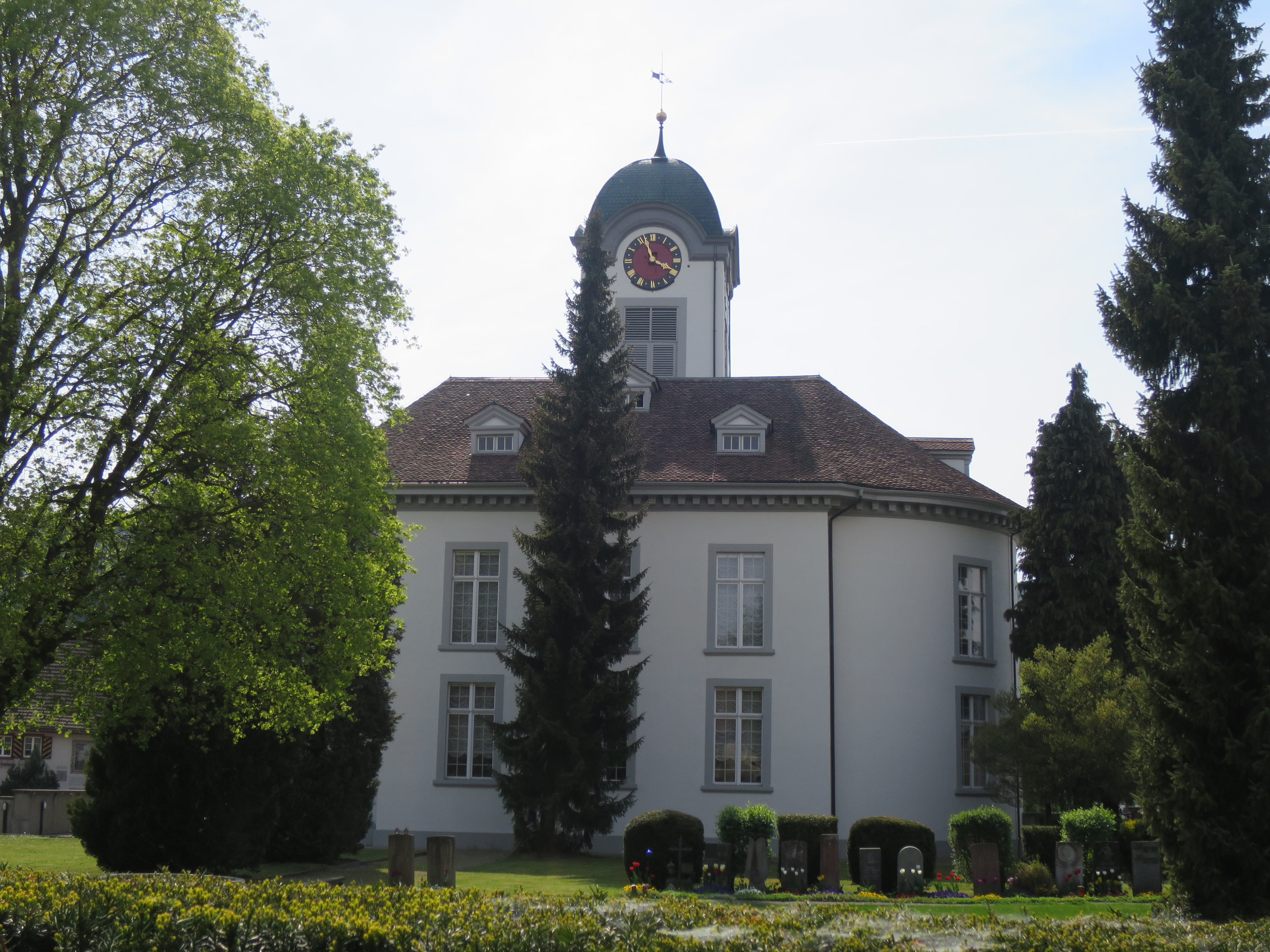 Ansicht der reformierten Kirche Embrach